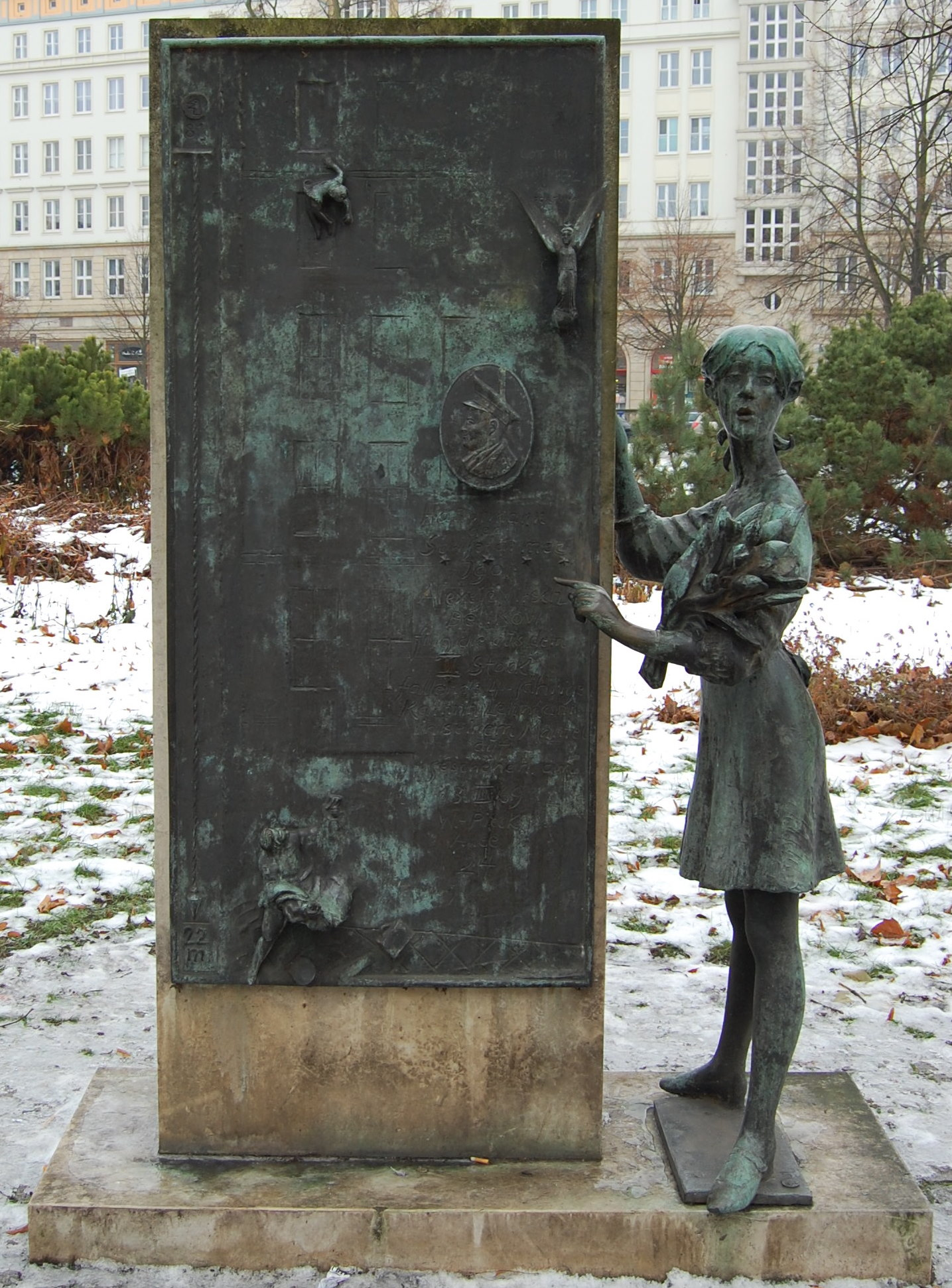 Plastik "Die Rettungstat des Hauptmanns Belikow" in Magdeburg, Vorderseite